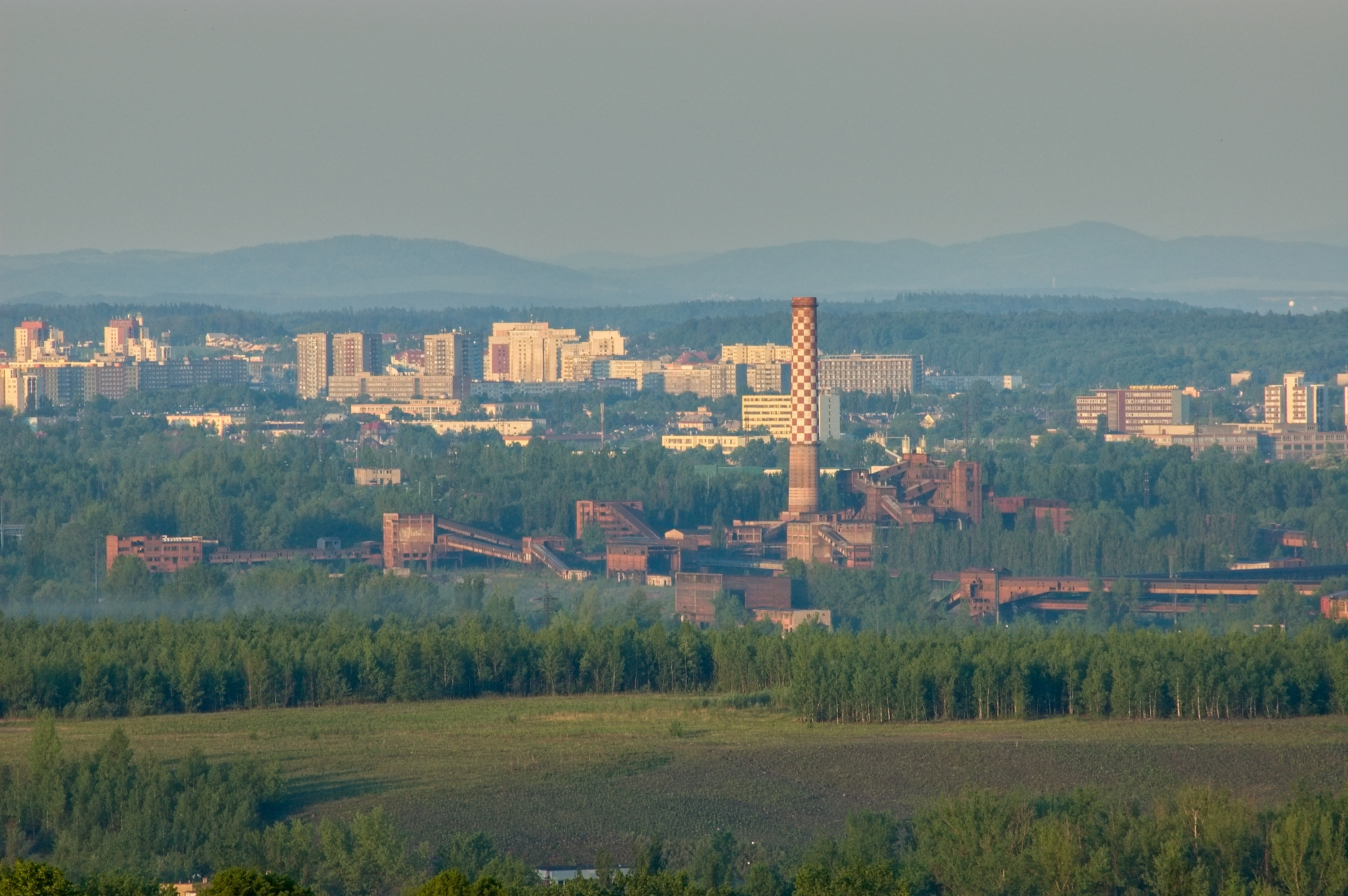 Česky: Vítkovice dolní oblast, jižní část